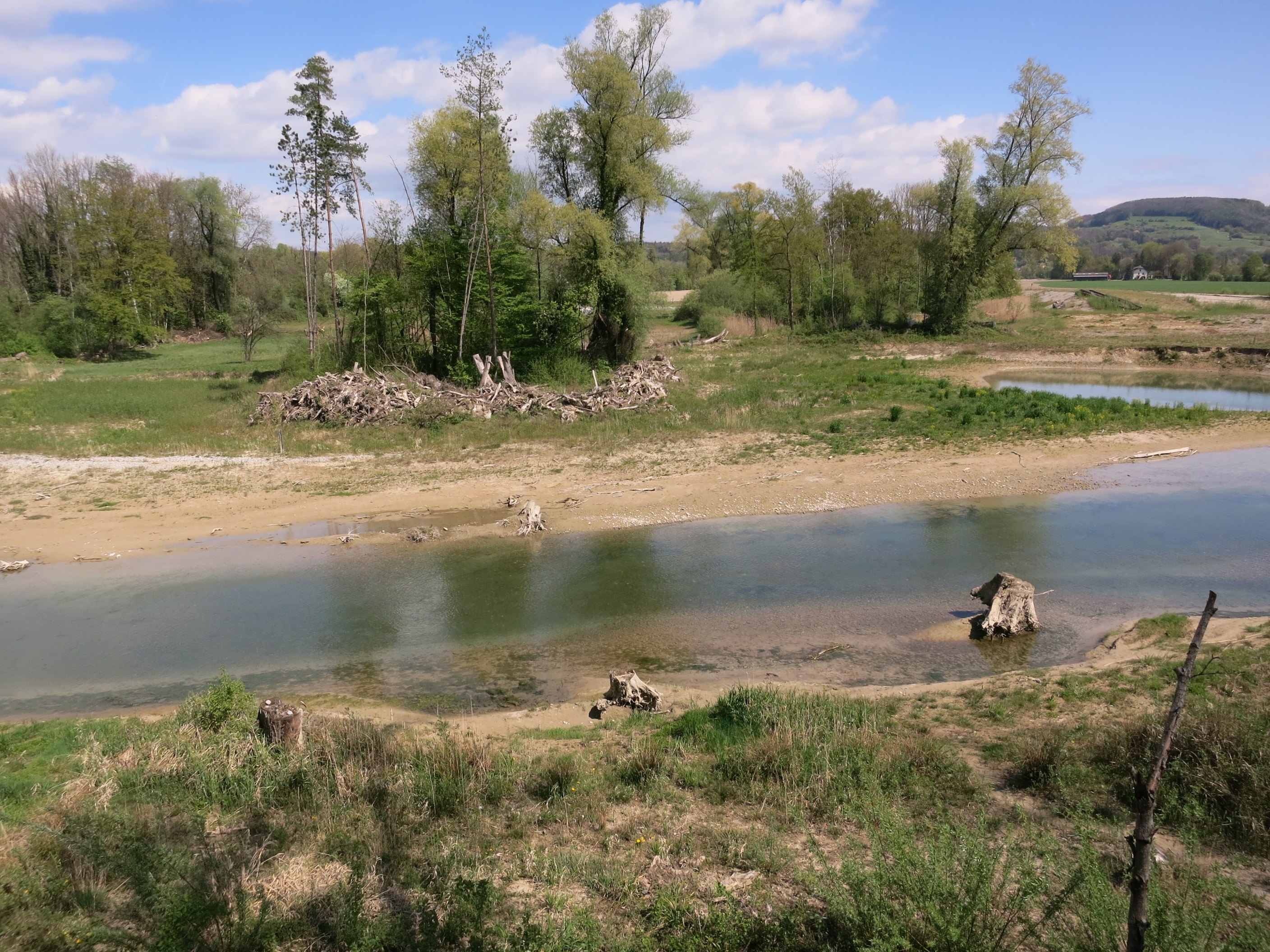 Chly Rhy Auen, Rietheim AG, Schweiz